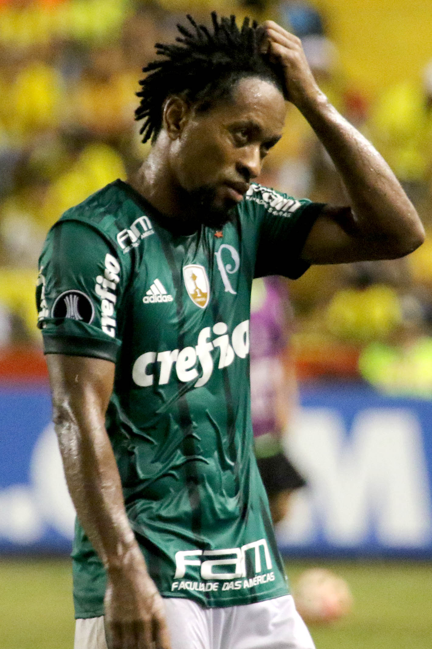 Guayaquil, miércoles 05 de julio del 2017 (Andes).-En el estadio Monumental, Barcelona enfrenta a Palmeiras por los octavos de final de la Copa Libertadores. En la gráfica Zé Roberto jugador delPalmeiras Foto:Andes/César Muñoz